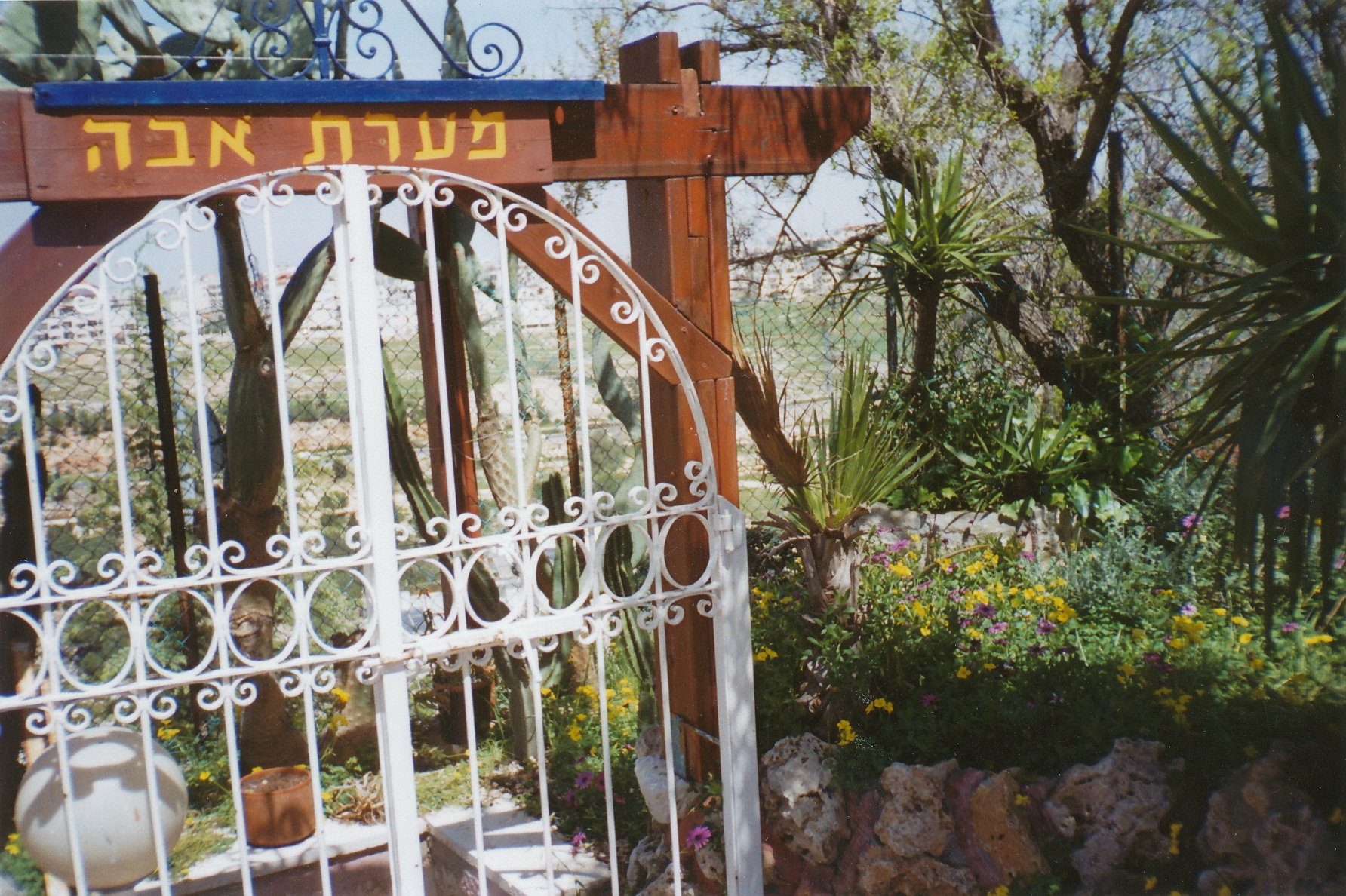 הכניסה למערת בית אבה כיום